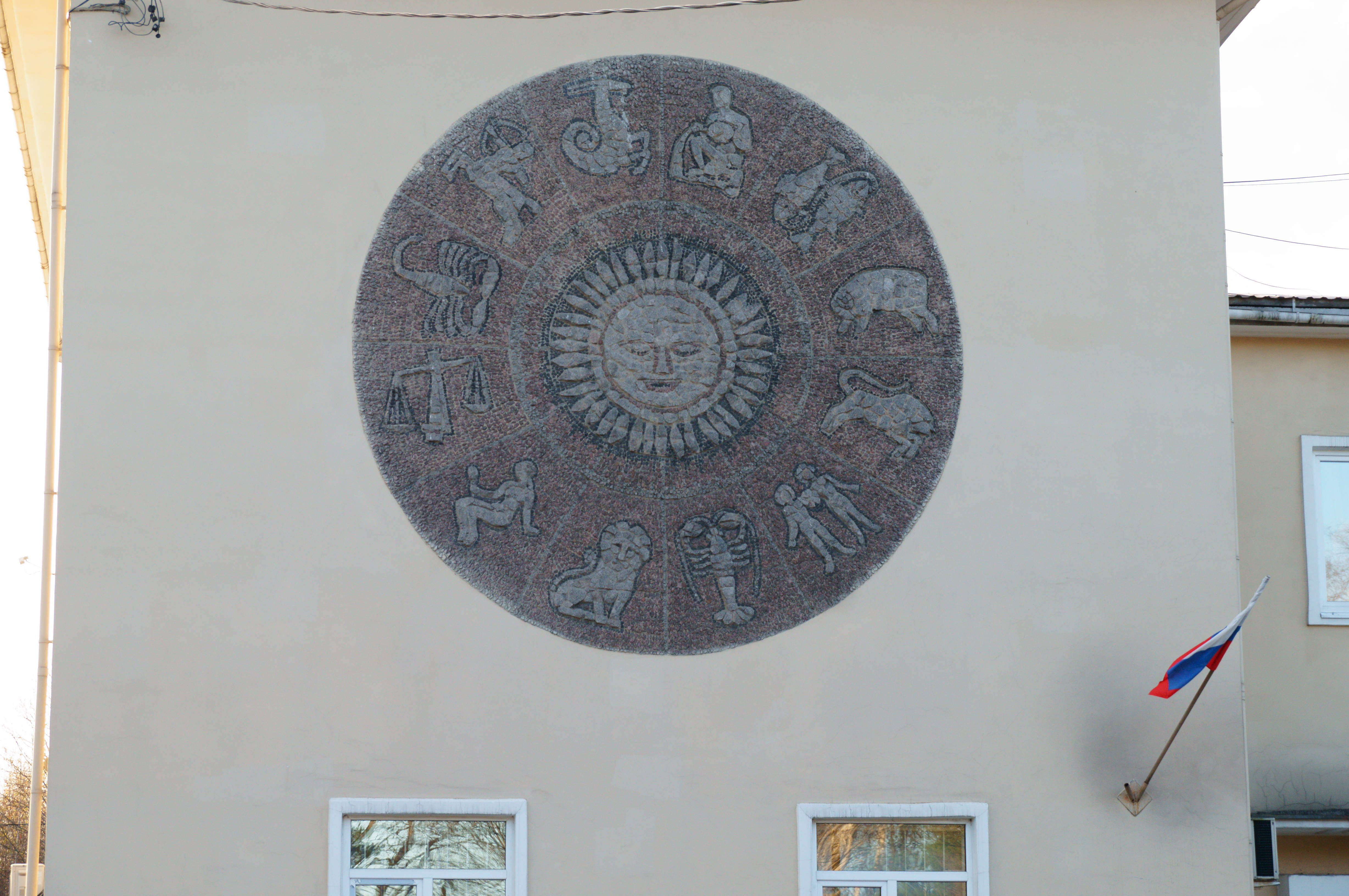 Народная школа Сорвали: пос. Гвардейский, улица Шестакова, 26-28, Выборг, Выборгский район, Ленинградская область